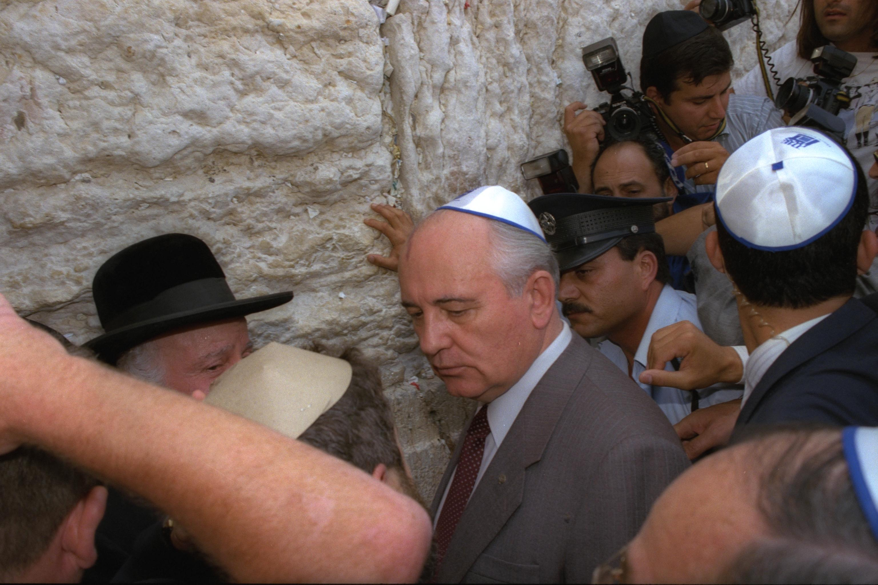 Mr. Mikhail Gorbachev at the Western Wall in Jerusalem. ביקור נשיא ברהמ לשעבר מיכאל גורבצ'וב בישראל. בצילום, ביקור מיכאל גורבצ'וב בכותל המערבי, בירושלים. Photo: KOREN ZIV, 06/16/1992